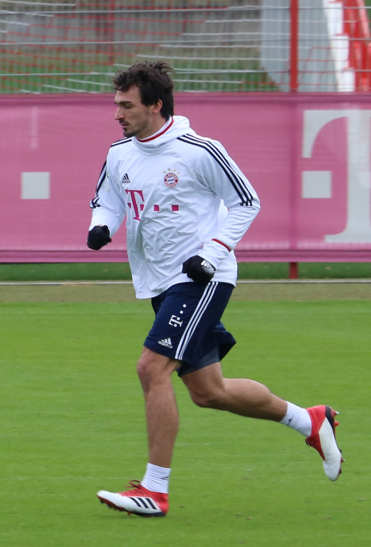 Mats Hummels beim Training auf dem Gelände des FC Bayern München (Januar 2018)